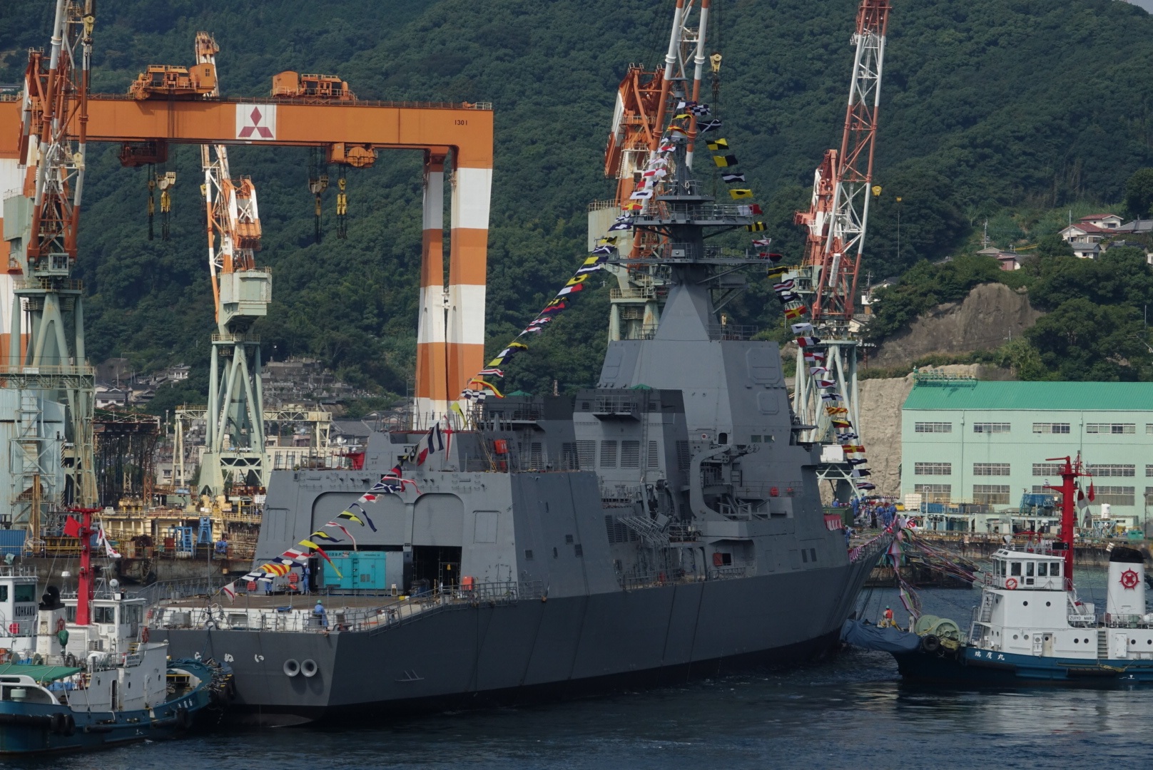 進水後ドックに移されている様子